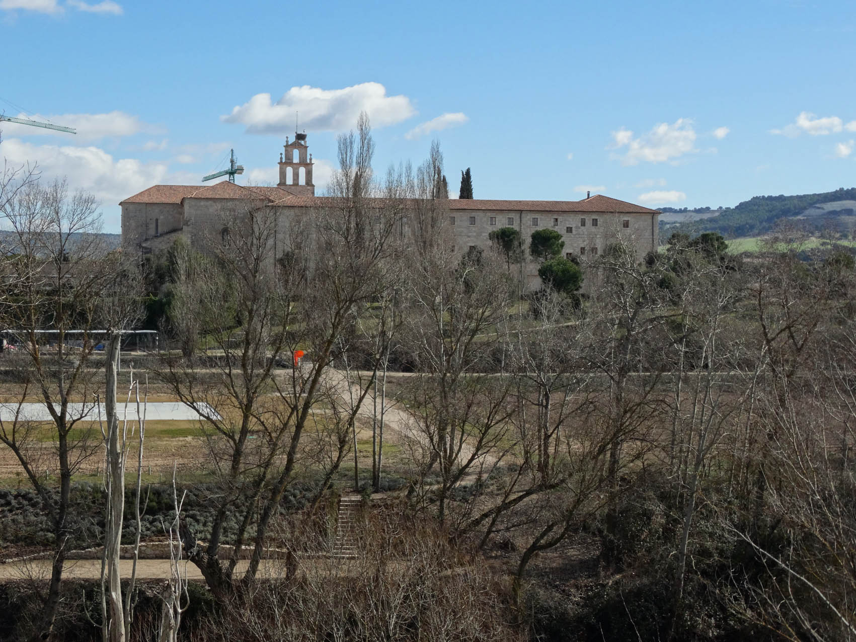 Sardoncillo o granja de Sardón, Valladolid, España. A poca distancia de la localidad de Sardón del Duero al otro lado del Canal del Duero y río Duero. Desde este espacio se ve la mole del monasterio de Santa María de Retuerta.